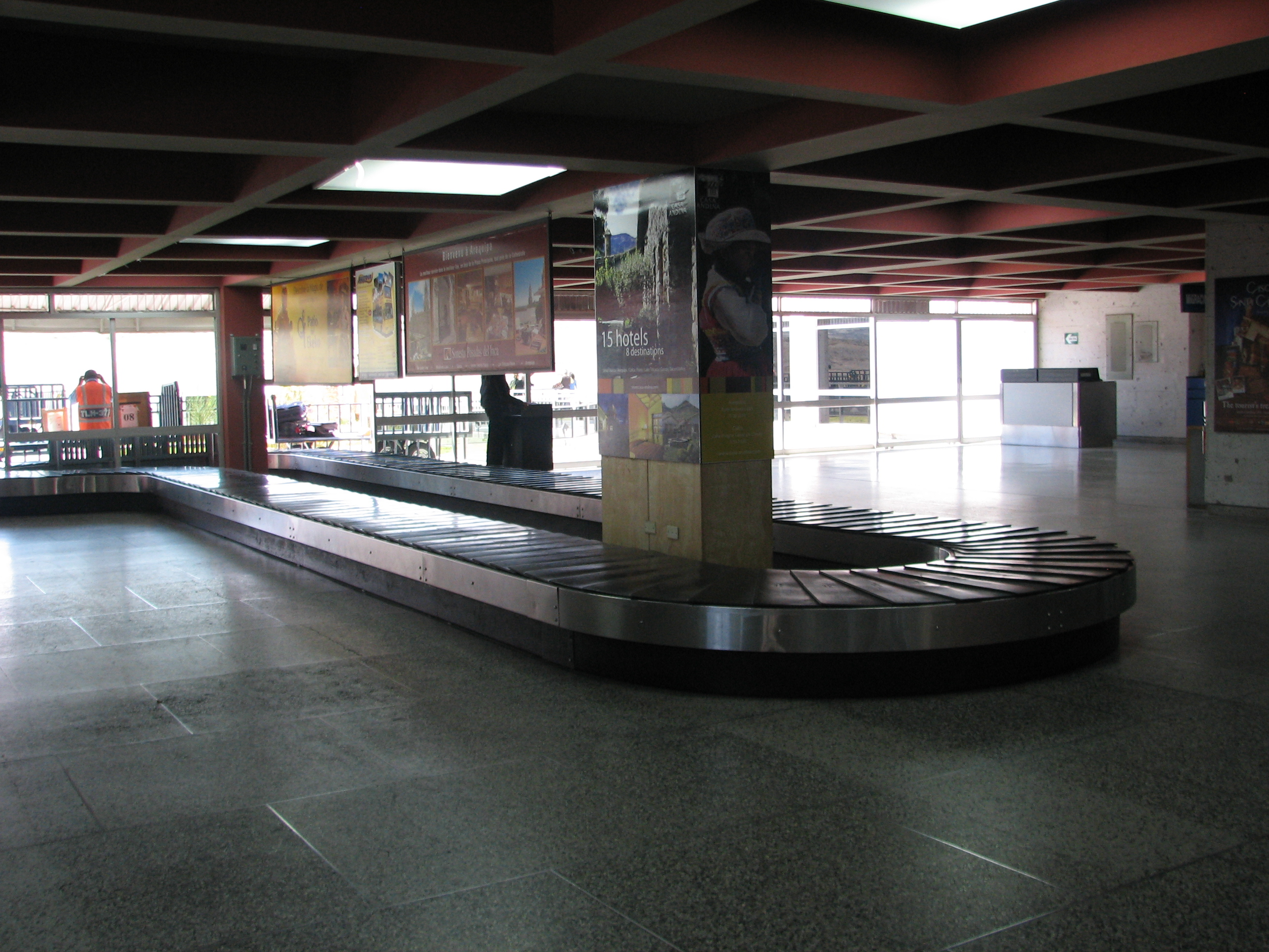 Luggage/Baggage belt at Arequipa Airport.